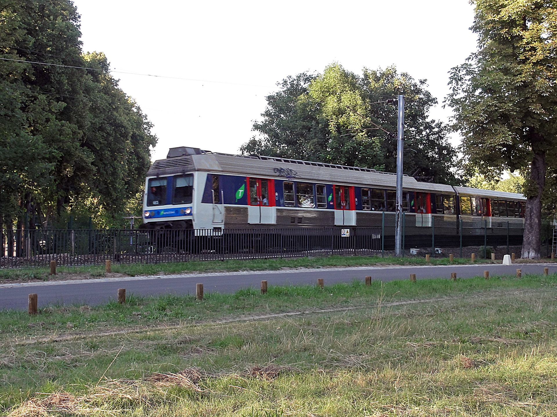 Un élément Z 6400 traverse le parc de Saint-Cloud (Hauts-de-Seine), sur la voie 1 de la ligne de Saint-Cloud à Saint-Nom-la-Bretêche.